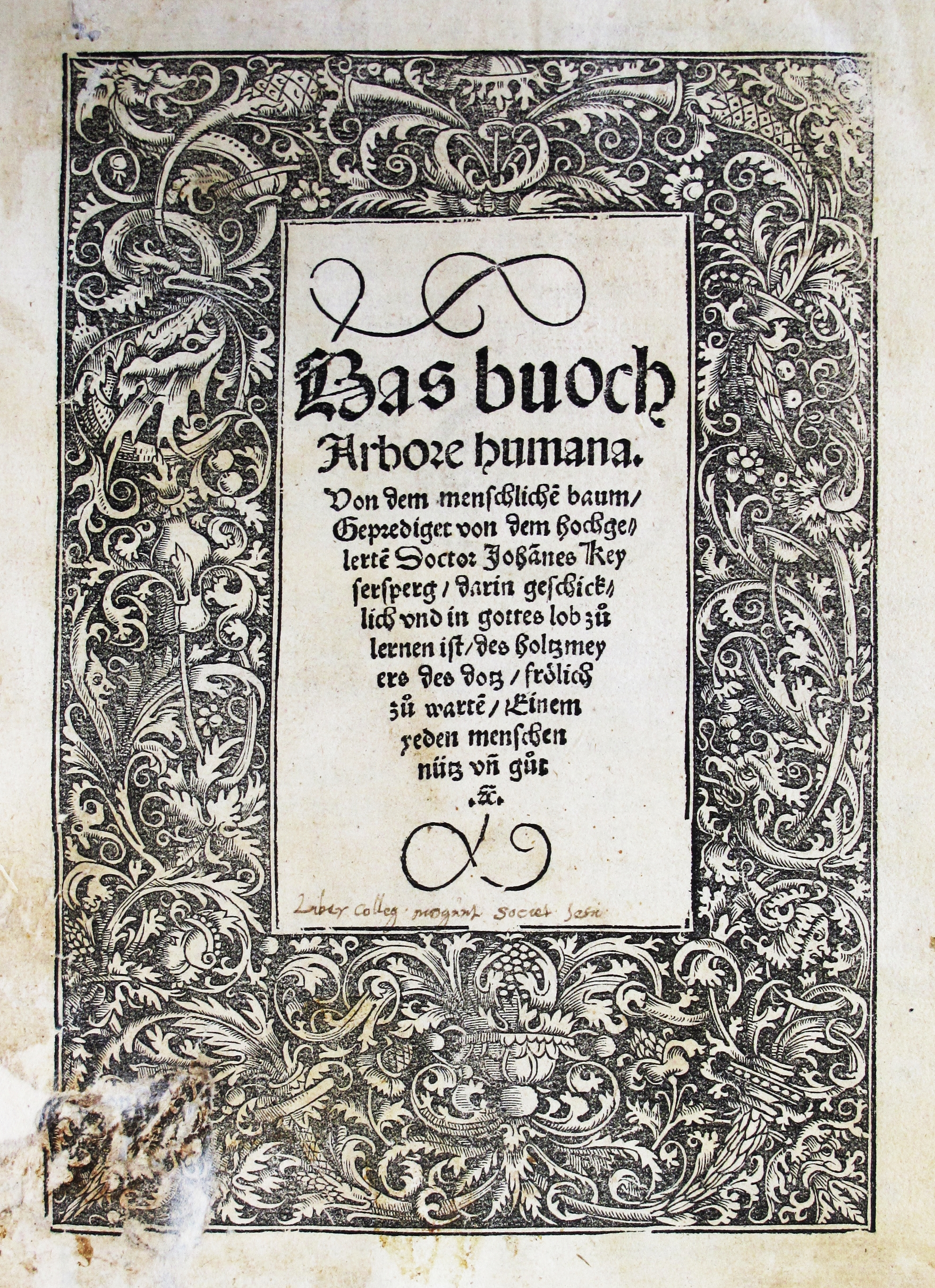 Titelblatt: Das buoch Arbore humana. : Von dem menschliche[n] baum, Geprediget von dem hochgelerte[n] Doctor Joha[n]nes Keysersperg, darin geschicklich vnd in gottes lob zu lernen ist, des holtzmeyers des dotz froelich zu warte[n] Einem yeden menschen nütz vn[n] gut .[et]c. / Geiler von Kaysersberg, Johannes. Straßburg: Grüninger, 1521. Vorbesitzer: Jesuitenkolleg Mainz. Wissenschaftliche Stadtbibliothek Mainz. Signatur: XIV g:2°/2 b